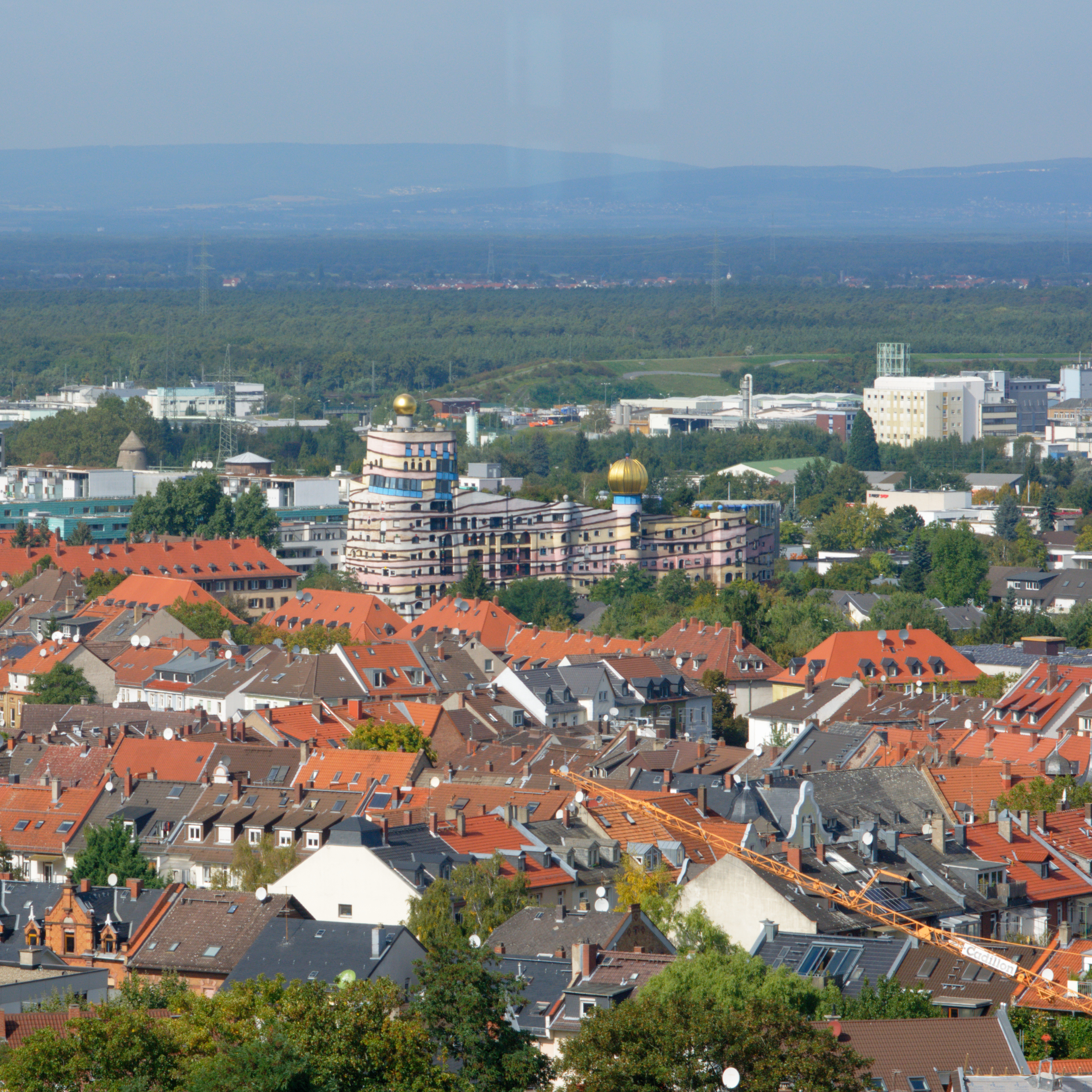 Blick vom Darmstädter Hochzeitsturm Richtung Waldspirale, Mainebene und Taunus